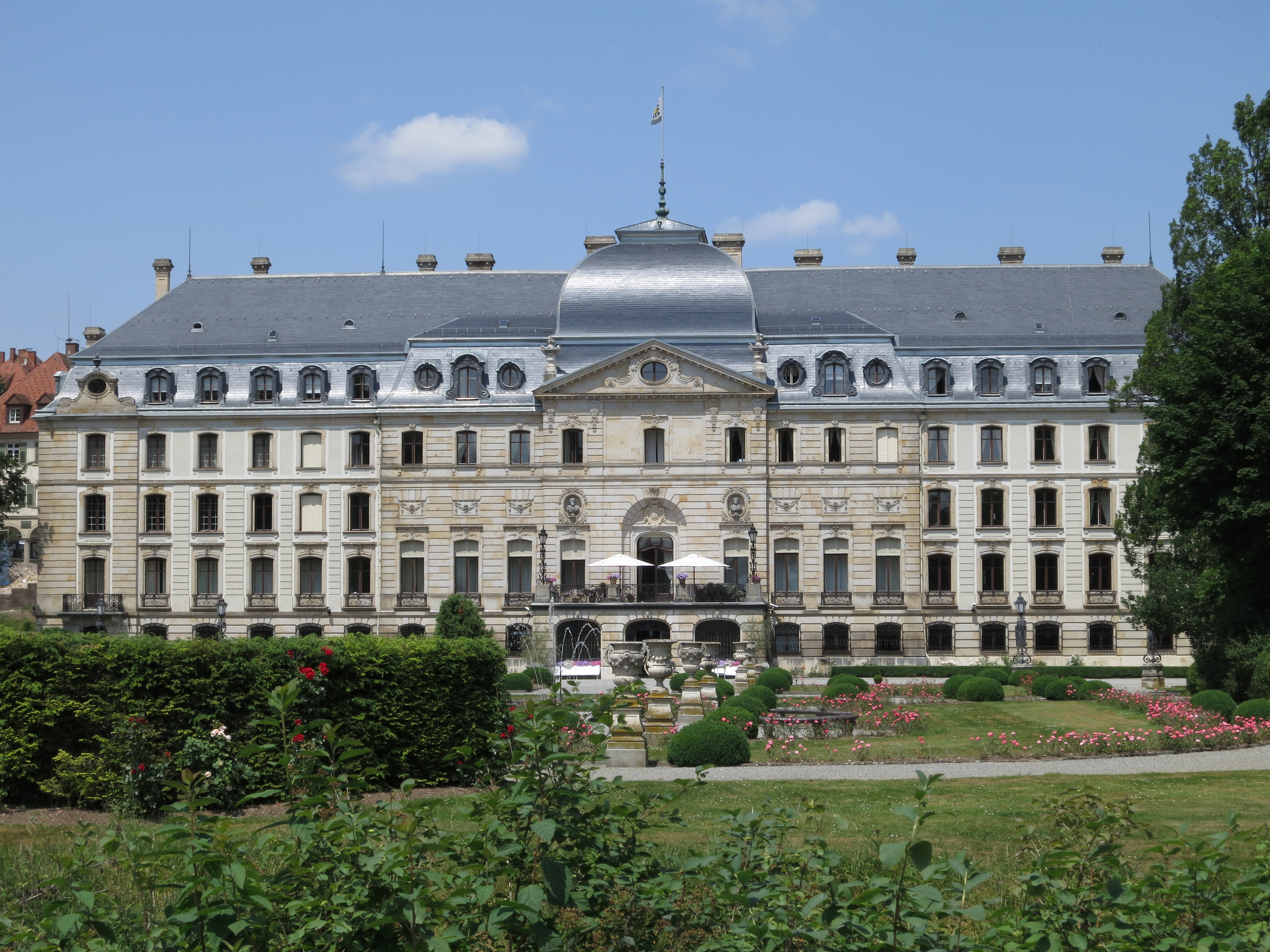 Fürstlich Fürstenbergisches Schloss in Donaueschingen.